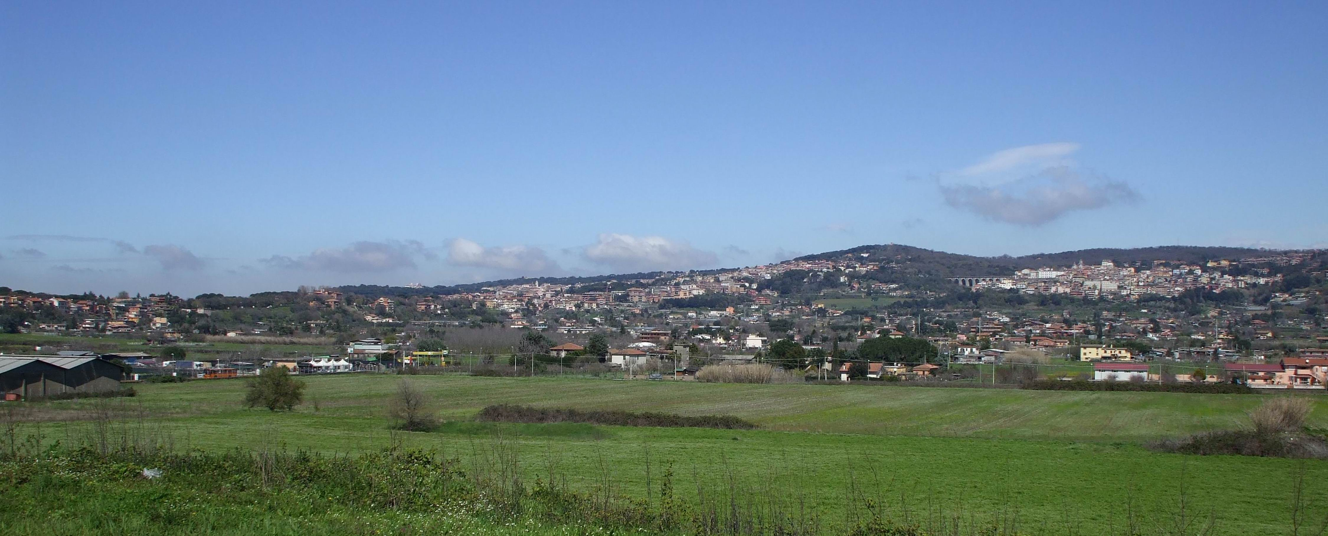 Albano Laziale ed Ariccia panorama da Vallericcia